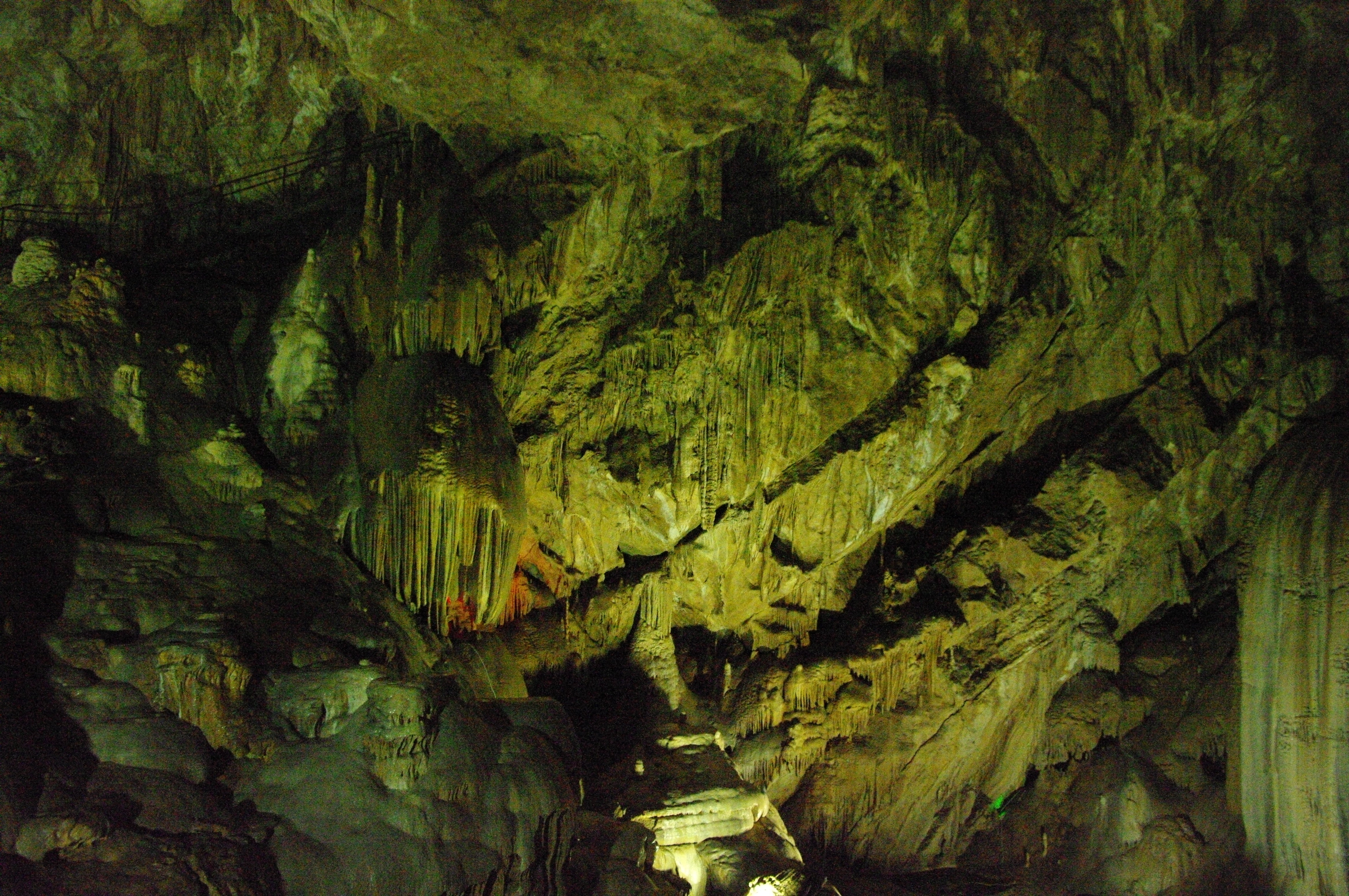 Вікіекспедиція до Абхазії